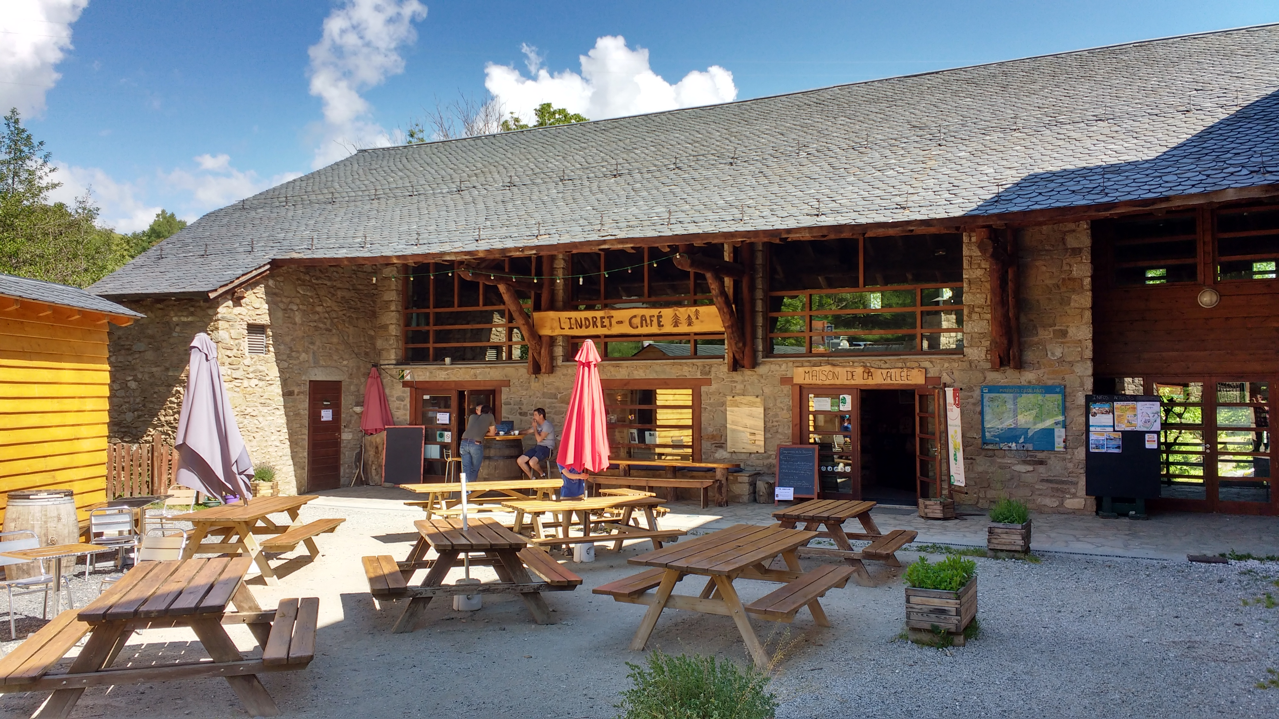 Maison de La Vallée. Le bâtiment est un ancien corps de ferme rénové qui abrite également la mairie.